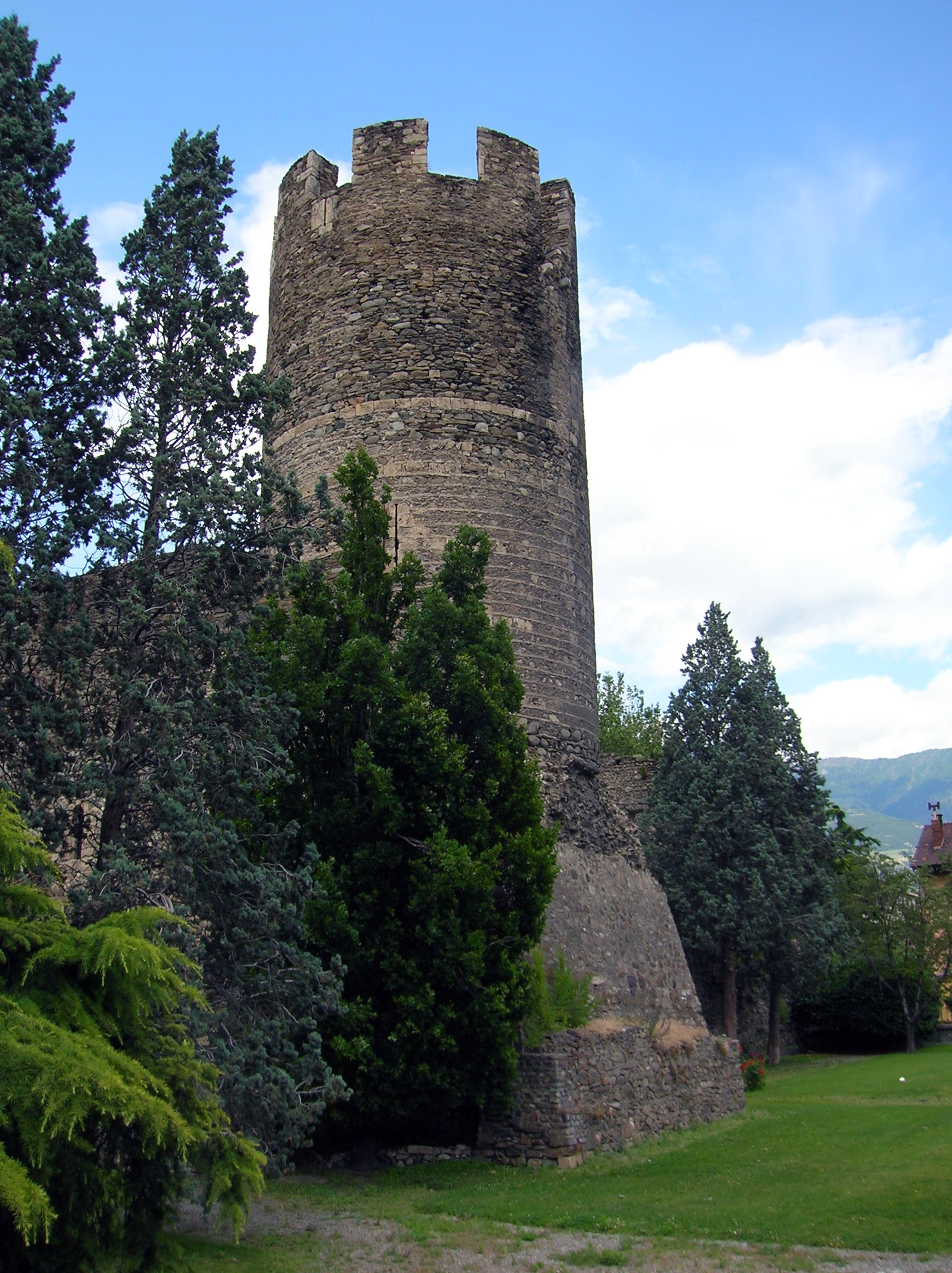 Castello di Bramafam, Aosta, Valle d'Aosta, Italia.